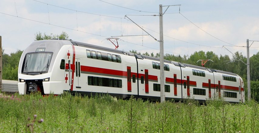 4-członowa jednostka GRS (ESh2, Stadler KISS «Eurasia») Kolei Gruzińskich